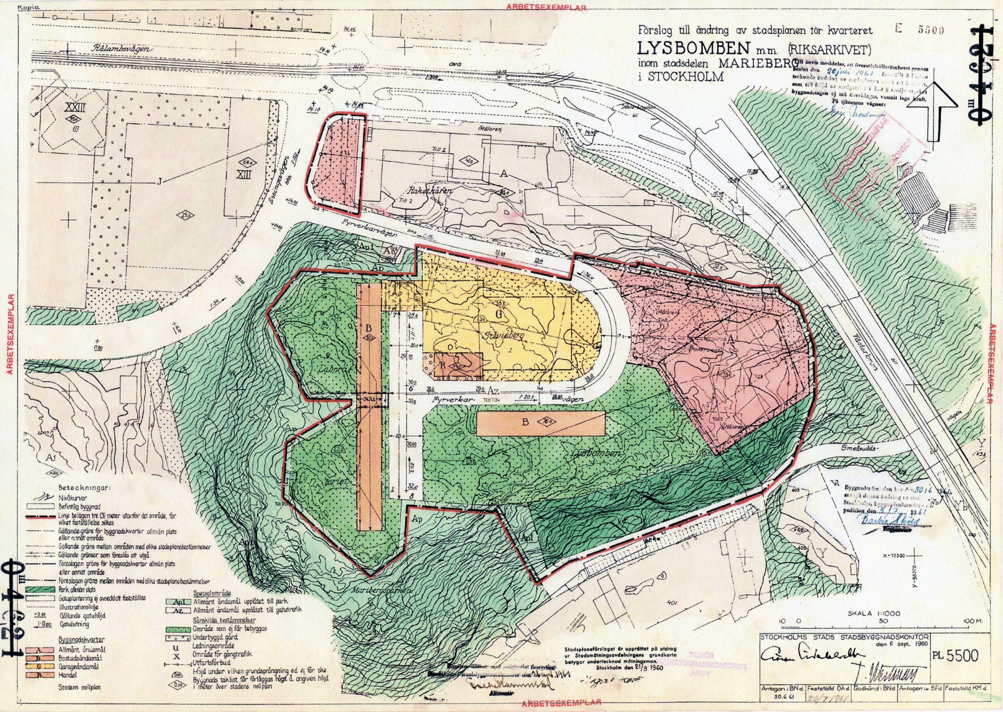 Stadsplan för kv. Lysbomben och Silvieberg inom stadsdelen Marieberg, Stockholm